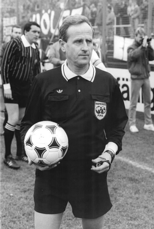 ADN-ZB-Settnik-10-12-88-ba-Berlin: Abschied von Pfeife und schwarzer Kluft nahm beim Pokal-Derby zwischen dem 1. FC Union Berlin und dem BFC Dynamo (Ergebnis 0:2) an der Alten Försterei der langjährige und verdienstvolle Schiedsrichter Adolf Prokop, der seit 1969 Oberliga-Spiele gepfiffen hat und 155 internationale Einsätze verbuchen kann.